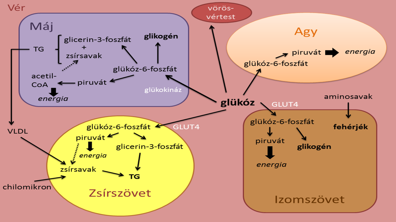 Jóllakott állapot